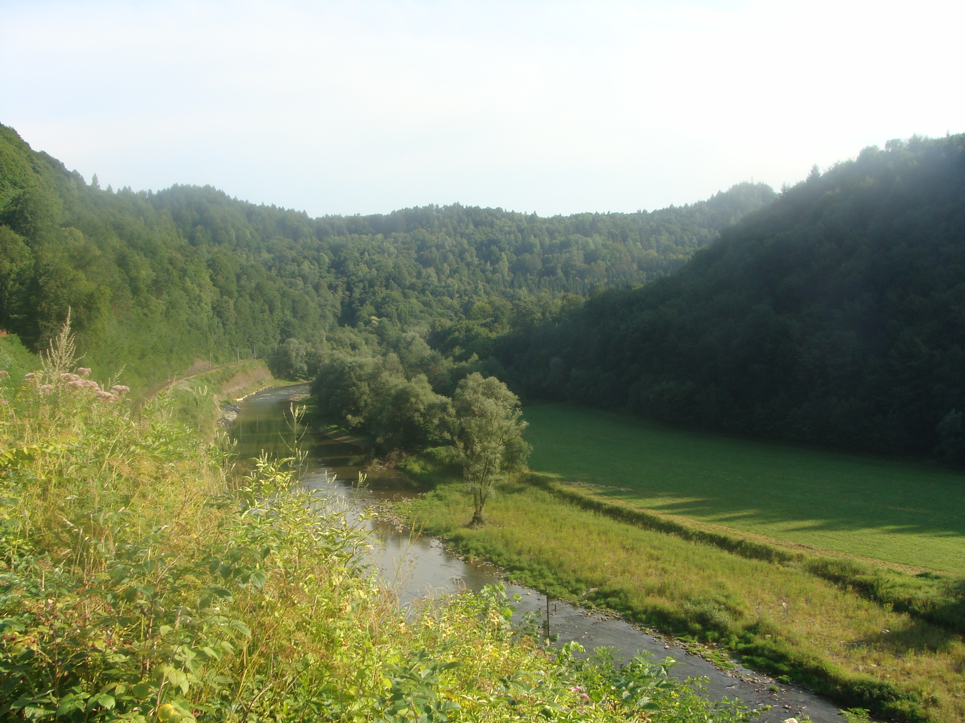 Poprad w okolicy Żegiestowa